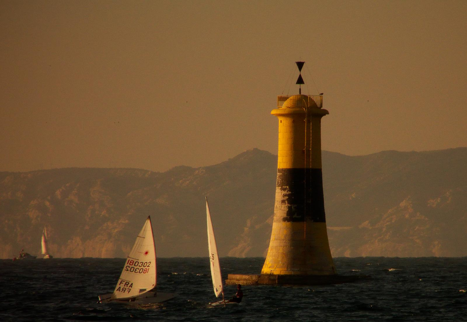 deux Lasers (voiliers légers) près du cardinal ouest, Vallon des Auffes, Marseilles. description original de flickr: "On vire à la bouée..."